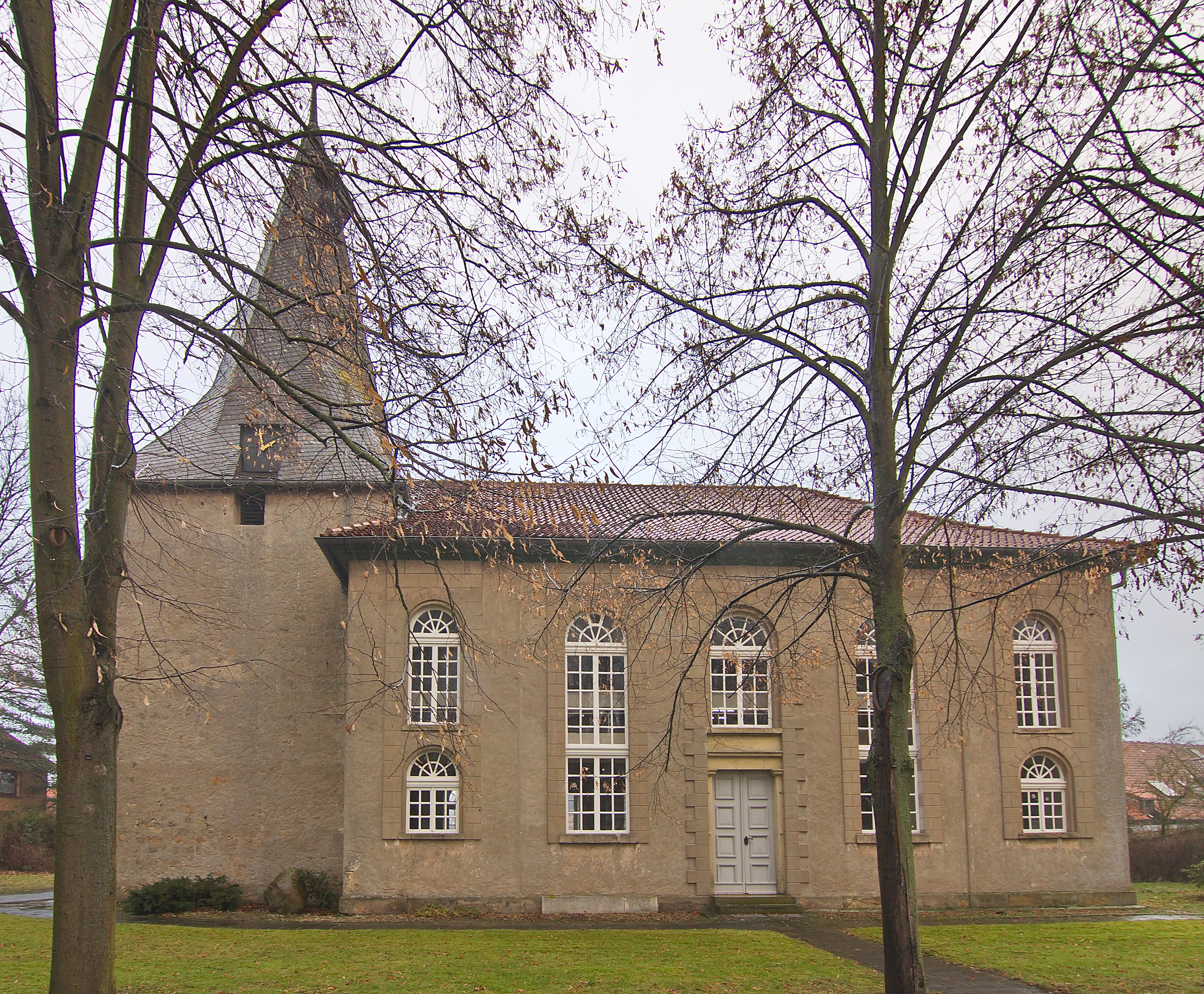 Die 1839 geweihte St.-Bernward-Kirche in Eddesse (Edemissen) ersetzte die wegen Baufälligkeit im ersten Drittel des 19. Jahrhunderts gesperrte Vorgängerkirche.